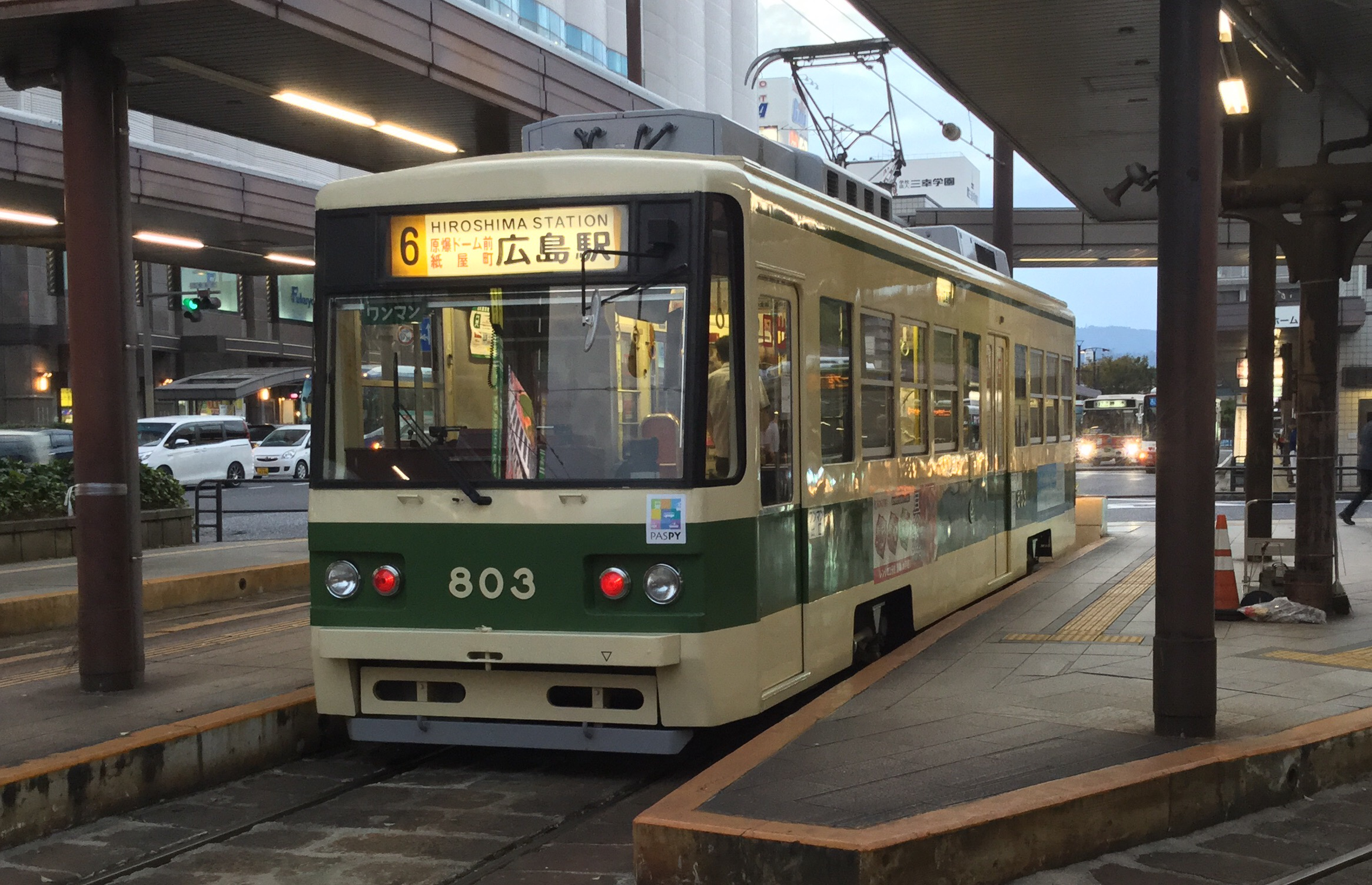 広島駅に停車中の広島電鉄800形の803号